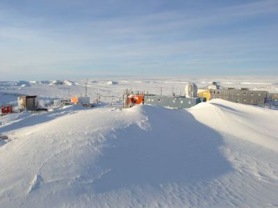 昭和基地の遠景。2003年撮影。